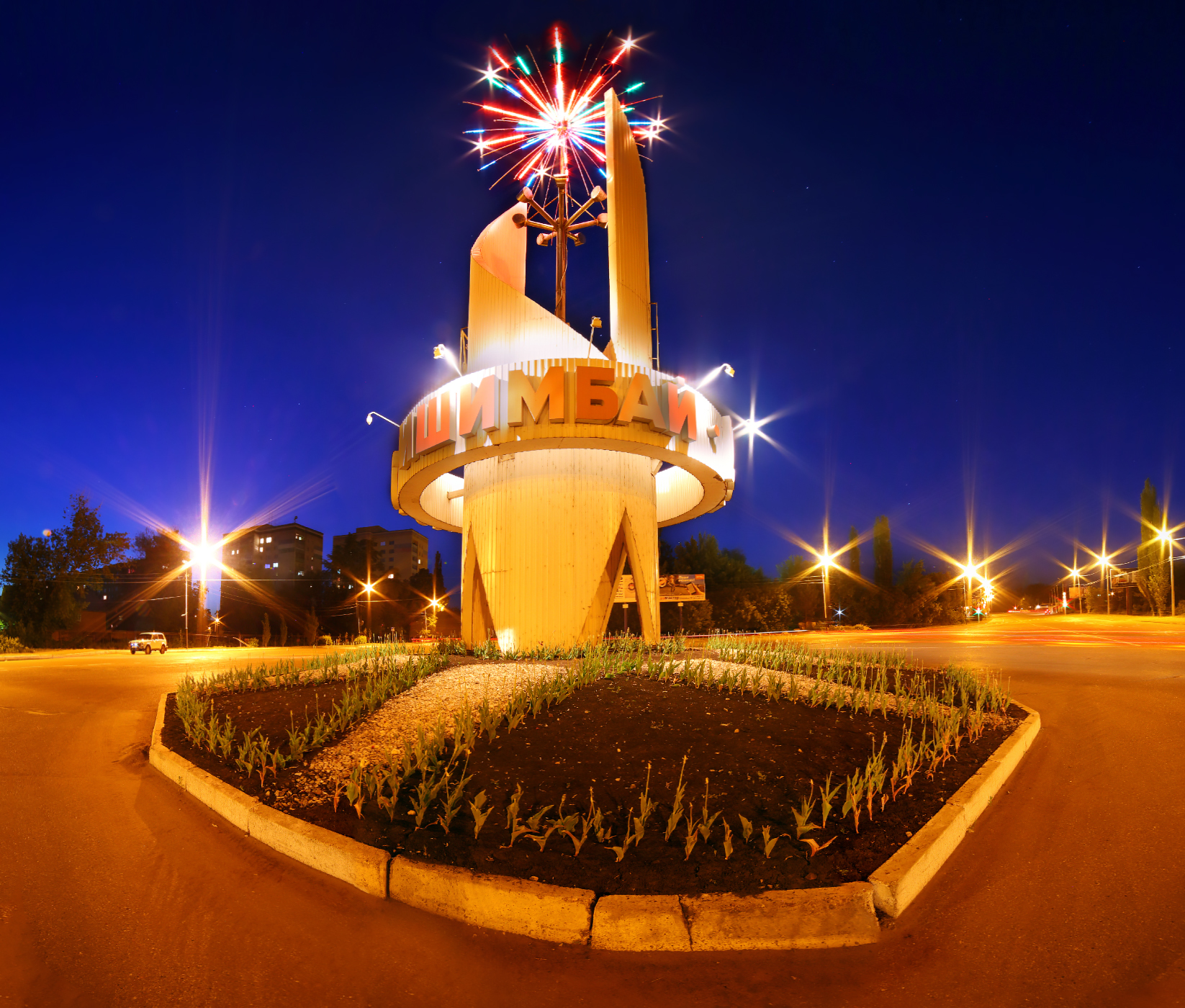 Въезд в Ишимбай в ночное время.